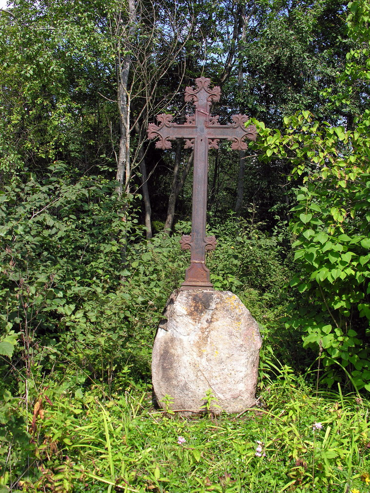 Paventė, Mažeikių rajonas, Viekšnių seniūnija Paventės kaimo kapinaičių kryžius Foto: Algirdas, 2006 m. rugpjūčio 20 d., Lietuva